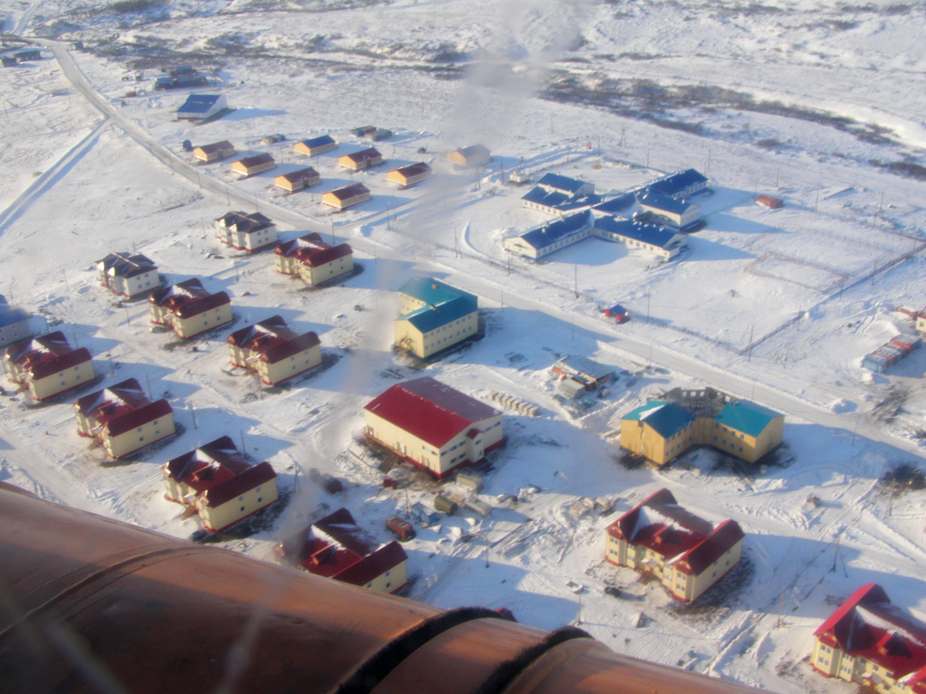 Поселок Верхние Тиличики, Корякия, Камчатский край, Россия